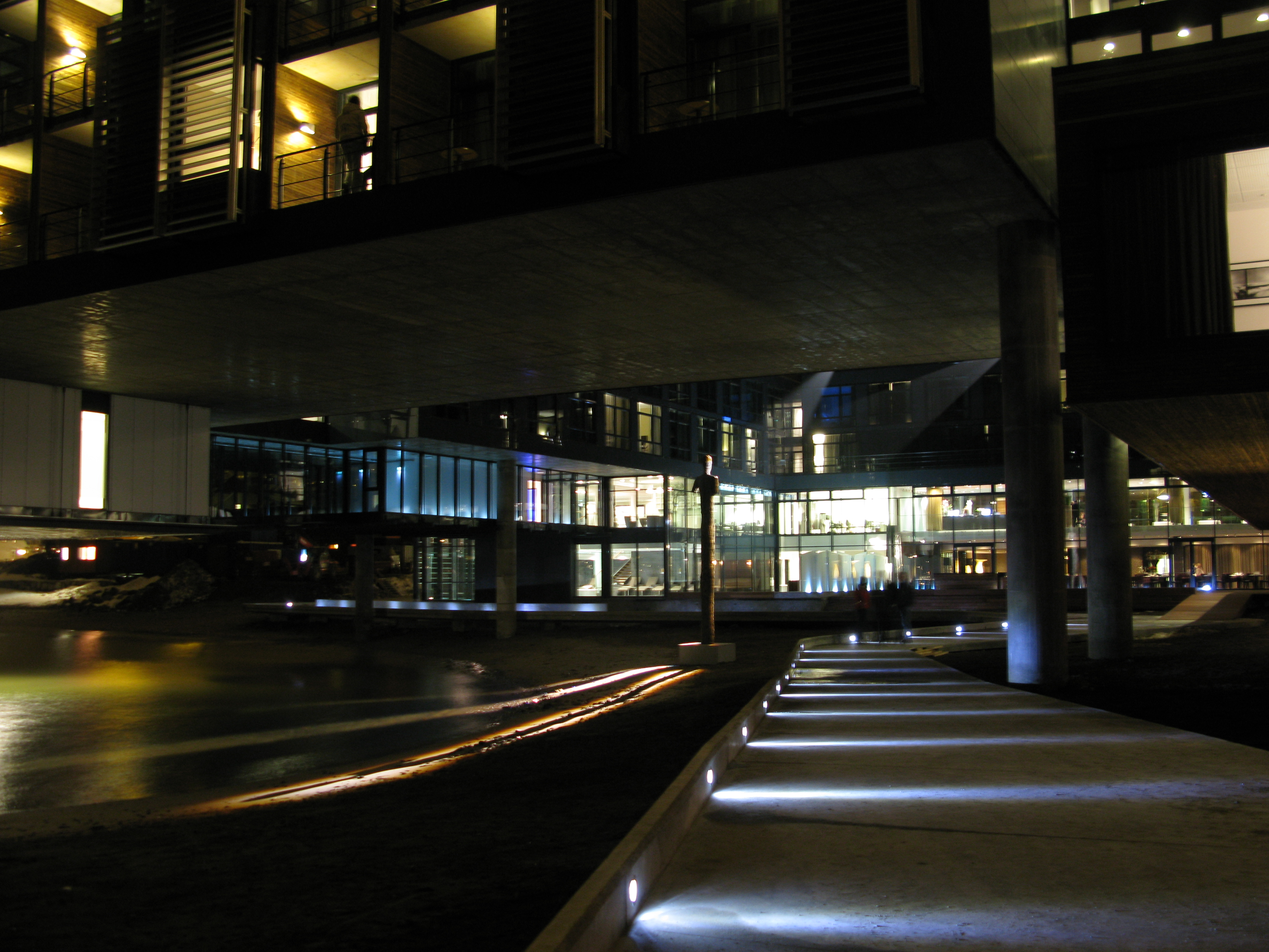 Farris Bad sett fra utsiden